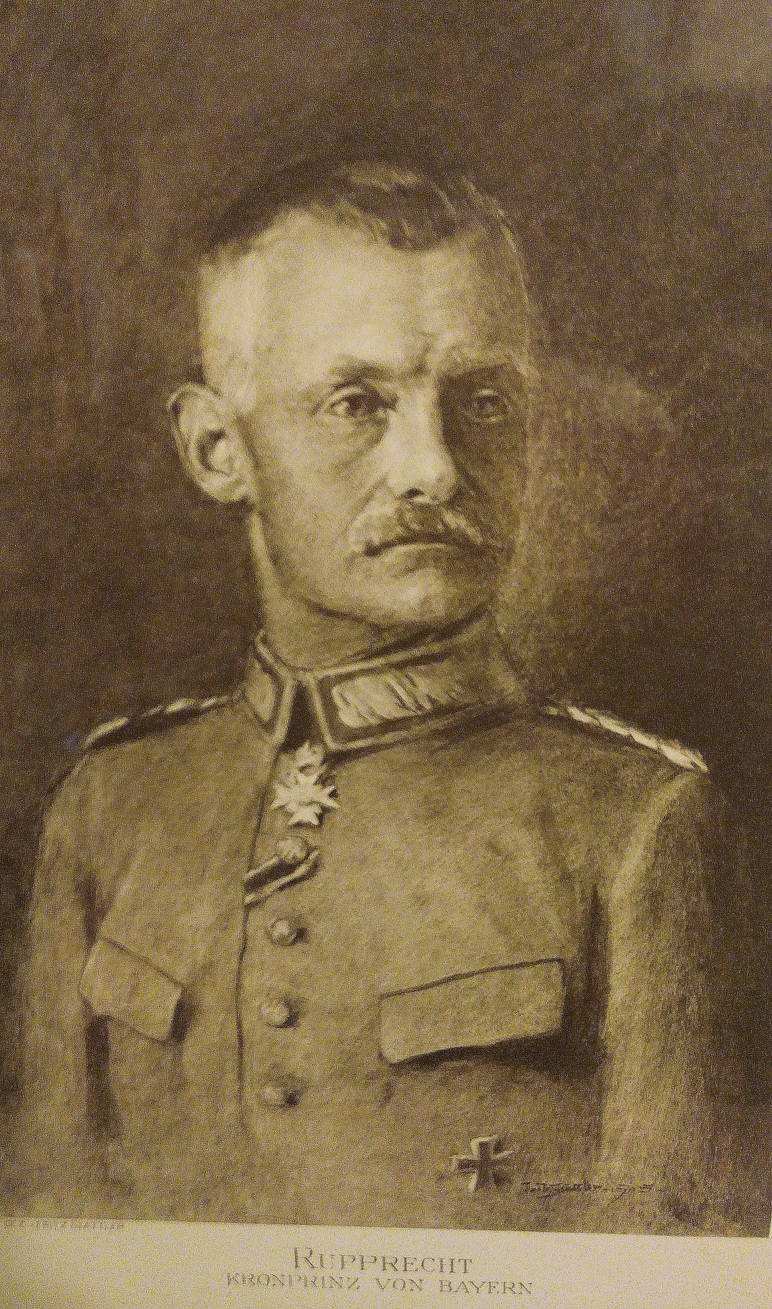 Kronprinz Rupprecht von Bayern, gezeichnet von Fritz Stattler (1867-1944), eigenes Foto von eigenem alten Bild